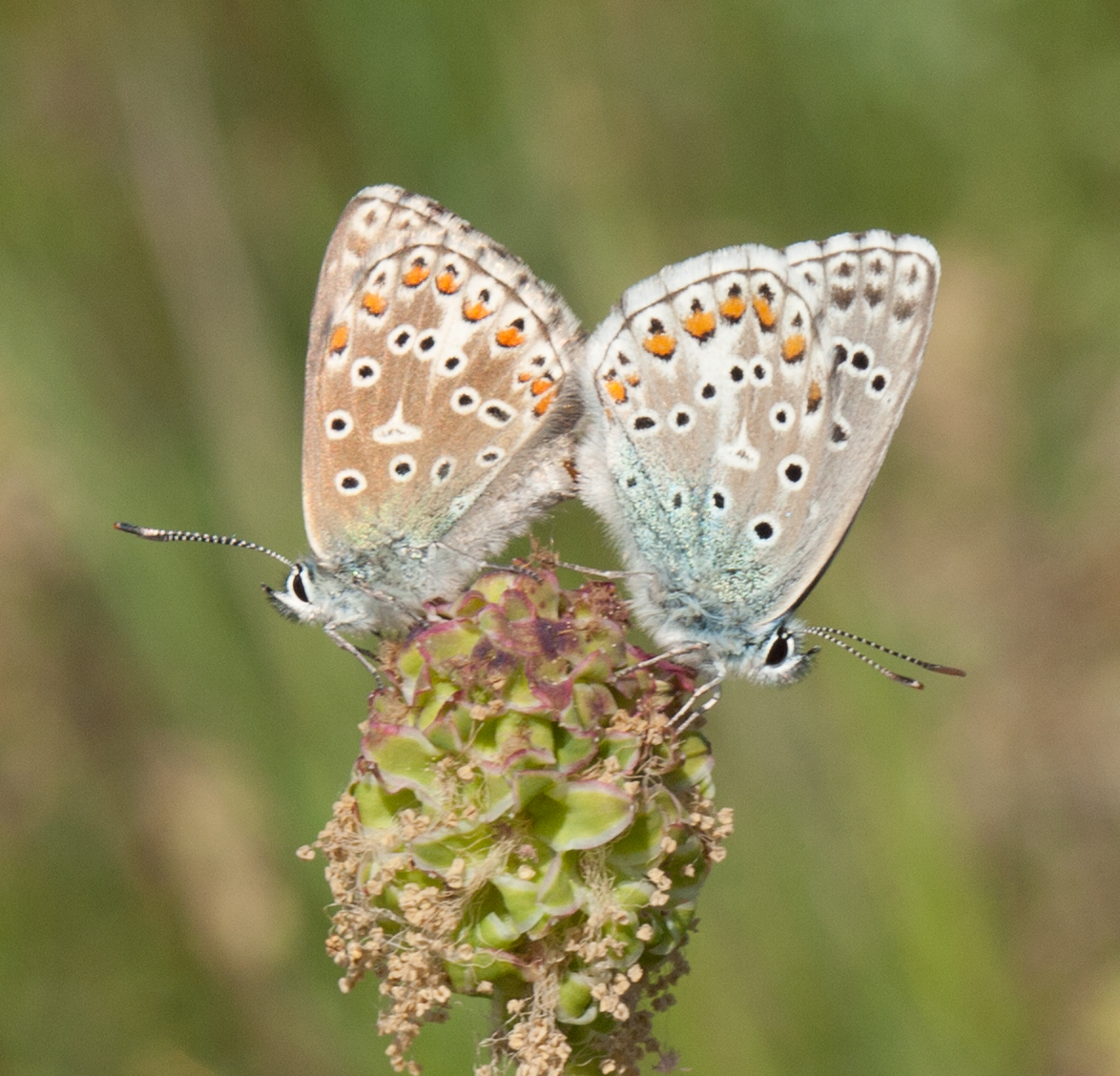 Polyommatus bellargus, mating, by Siggenthal. Aufgenommen oben auf dem Bahndamm bei ca.. 47.503200 8.240700.